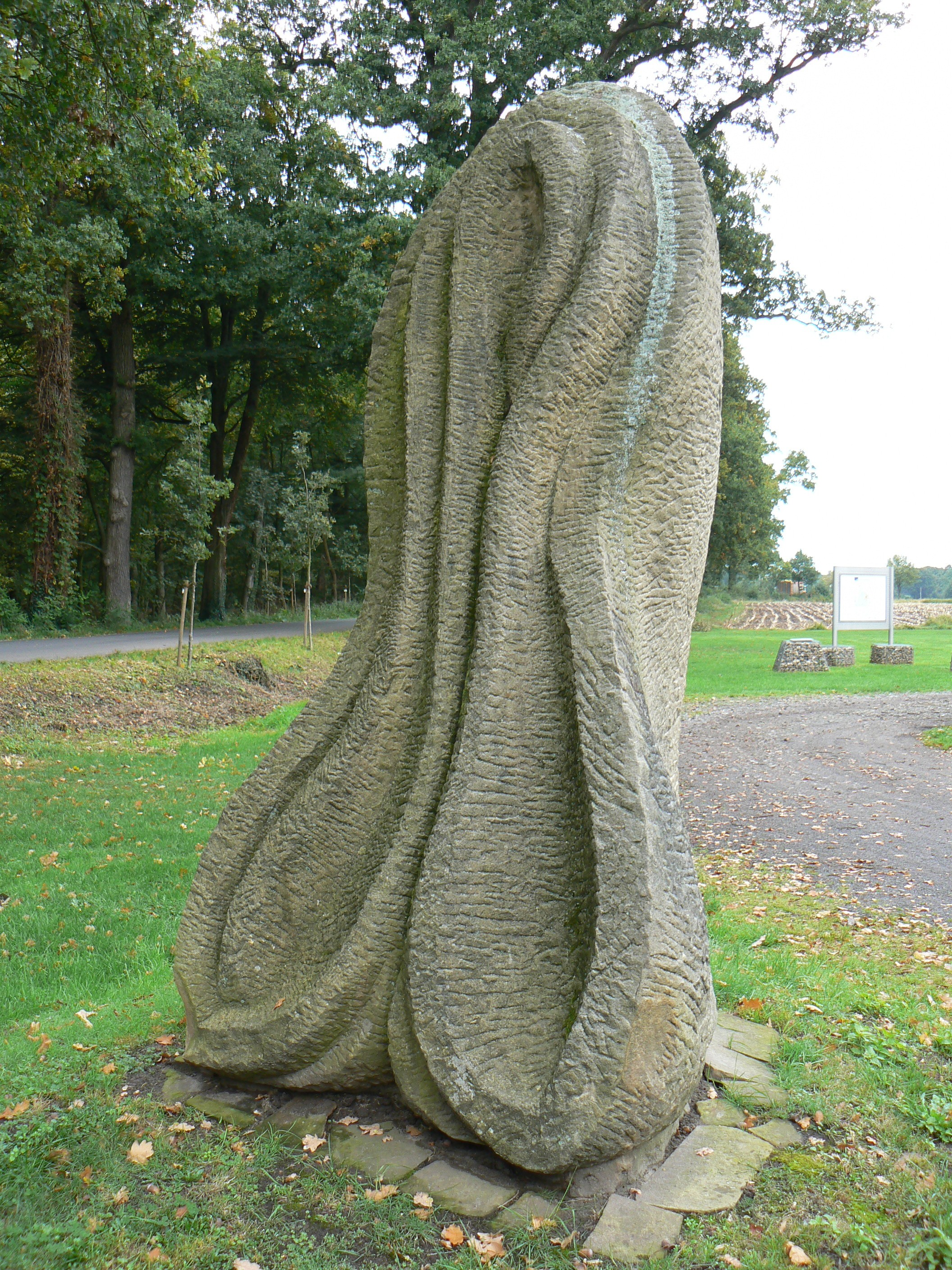 sculpture Faltung (1982) by Peter Rübsam in Nordhorn/Germany